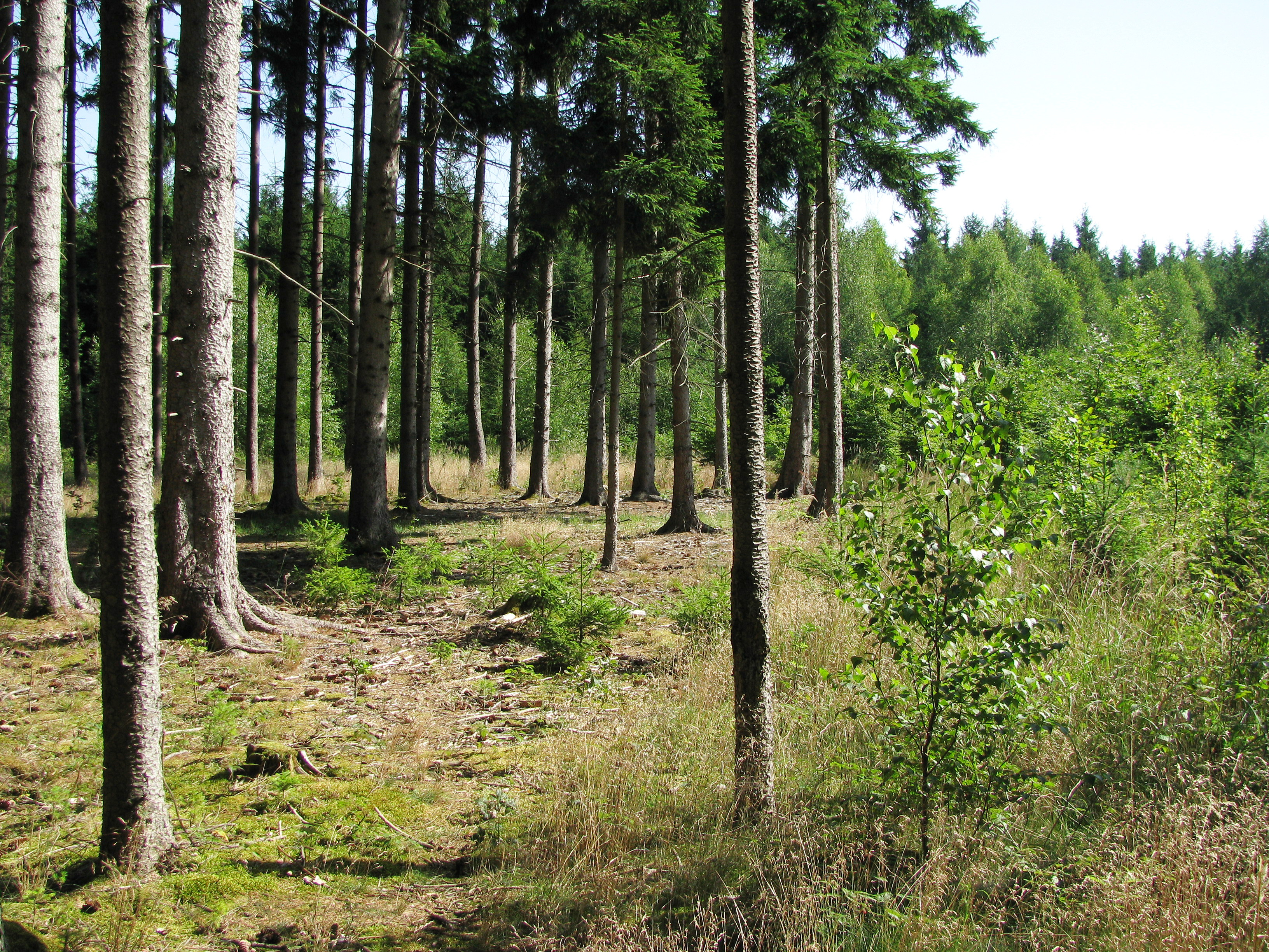 Truderinger Wald